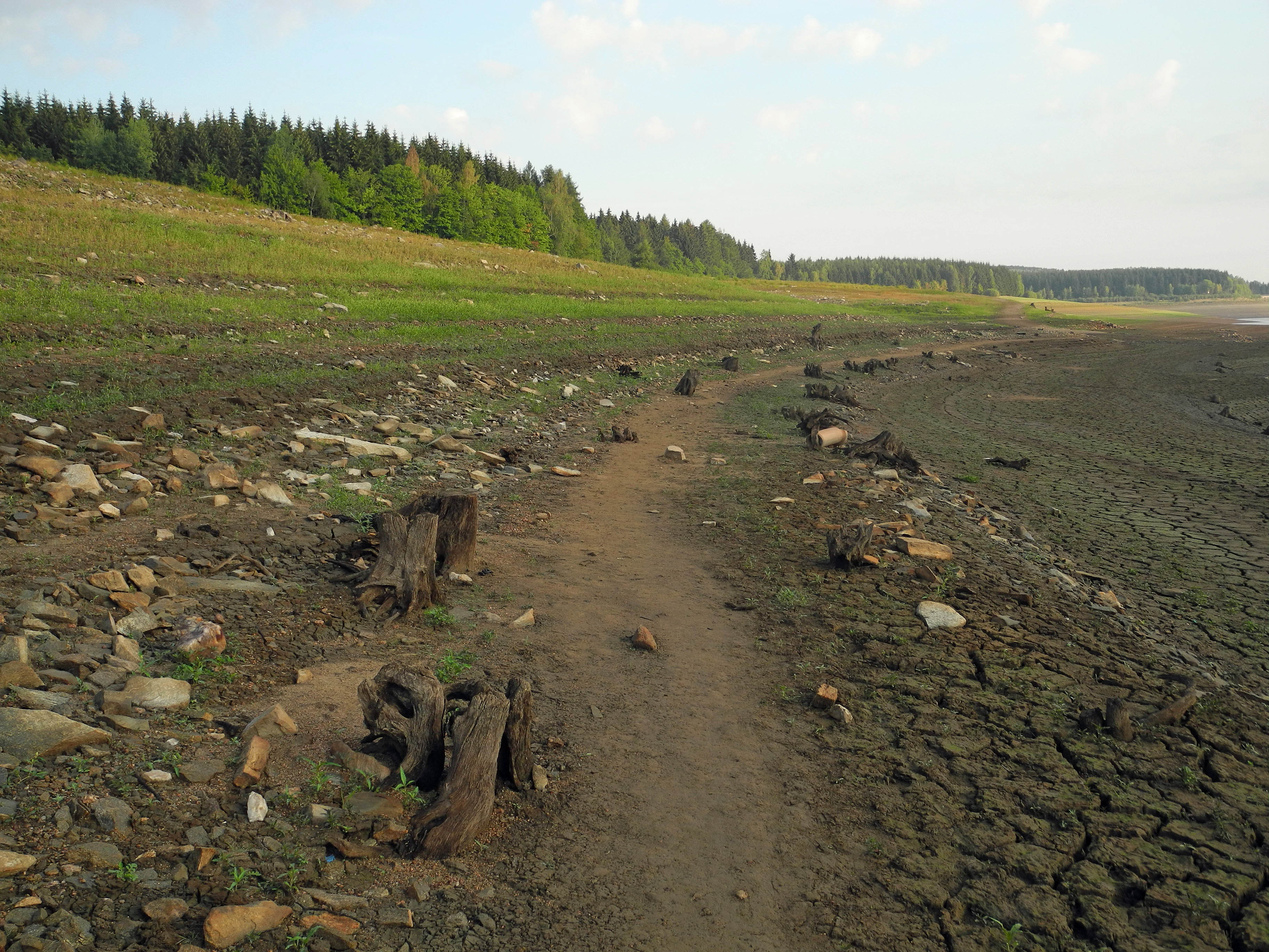 Leere Talsperre Lehnmühle im Tal der Wilden Weißeritz im Erzgebirge – Blick nach Norden, hier der ehem. Fahrweg (Talstraße) mit Bäumen am linken Ufer der Wilden Weißeritz